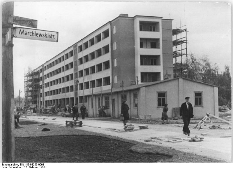 ADN-ZB Schmidtke 12.10.1950 Gerüste der Wohnzelle fallen. Am 1. Bauabschnitt der Wohnzelle Karl-Marx-Allee in Berlin wurden am 12.10.50 die Gerüste entfernt. UBz: Blick auf den fertigen Wohnblock. Leihweise Illus Berlin W8